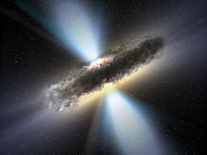 Hình minh họa mô tả chuẩn tinh siêu sáng S5 0014+81 bao quanh bởi đĩa bồi tụ dày và hai luồng bức xạ cực mạnh. Credit: NASA.